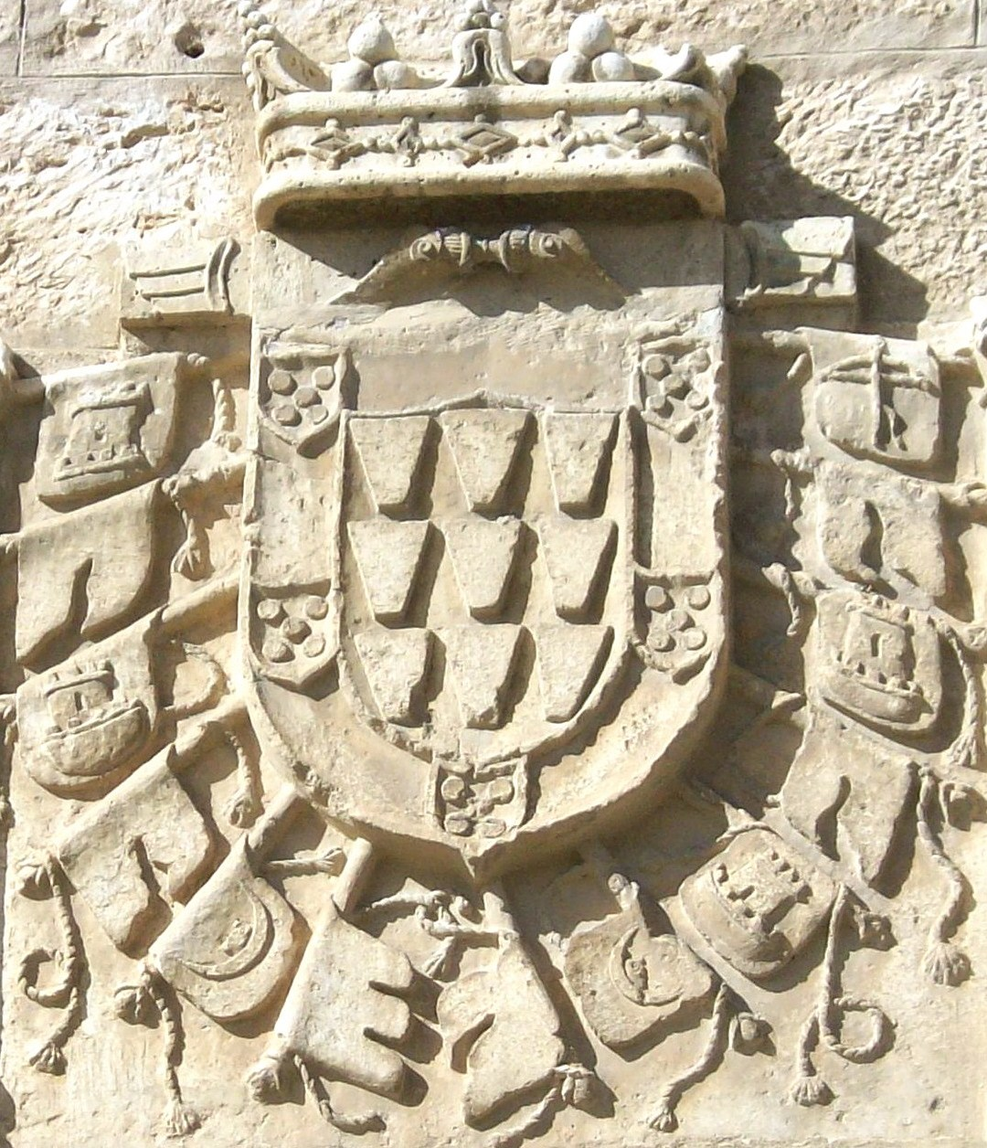 Escudo de los condes de Buendía sobre la puerta de la iglesia del antiguo Hospital de Santiago Apostol de Dueñas, provincia de Palencia, (España).